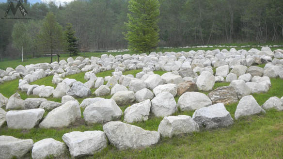 giardino zen Pieve Tesino